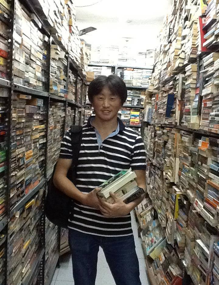 Монгол: м